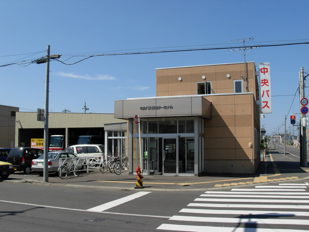 Rumoi bus terminal(Hokkaido Chuo Bus)